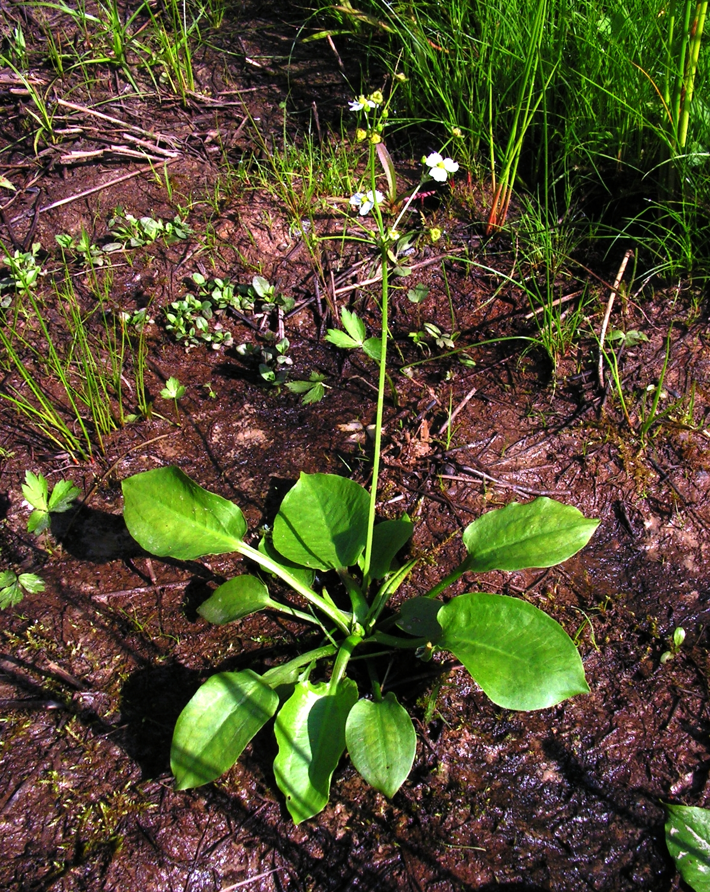 Alisma plantago-aquatica. Moscow region, Russia.